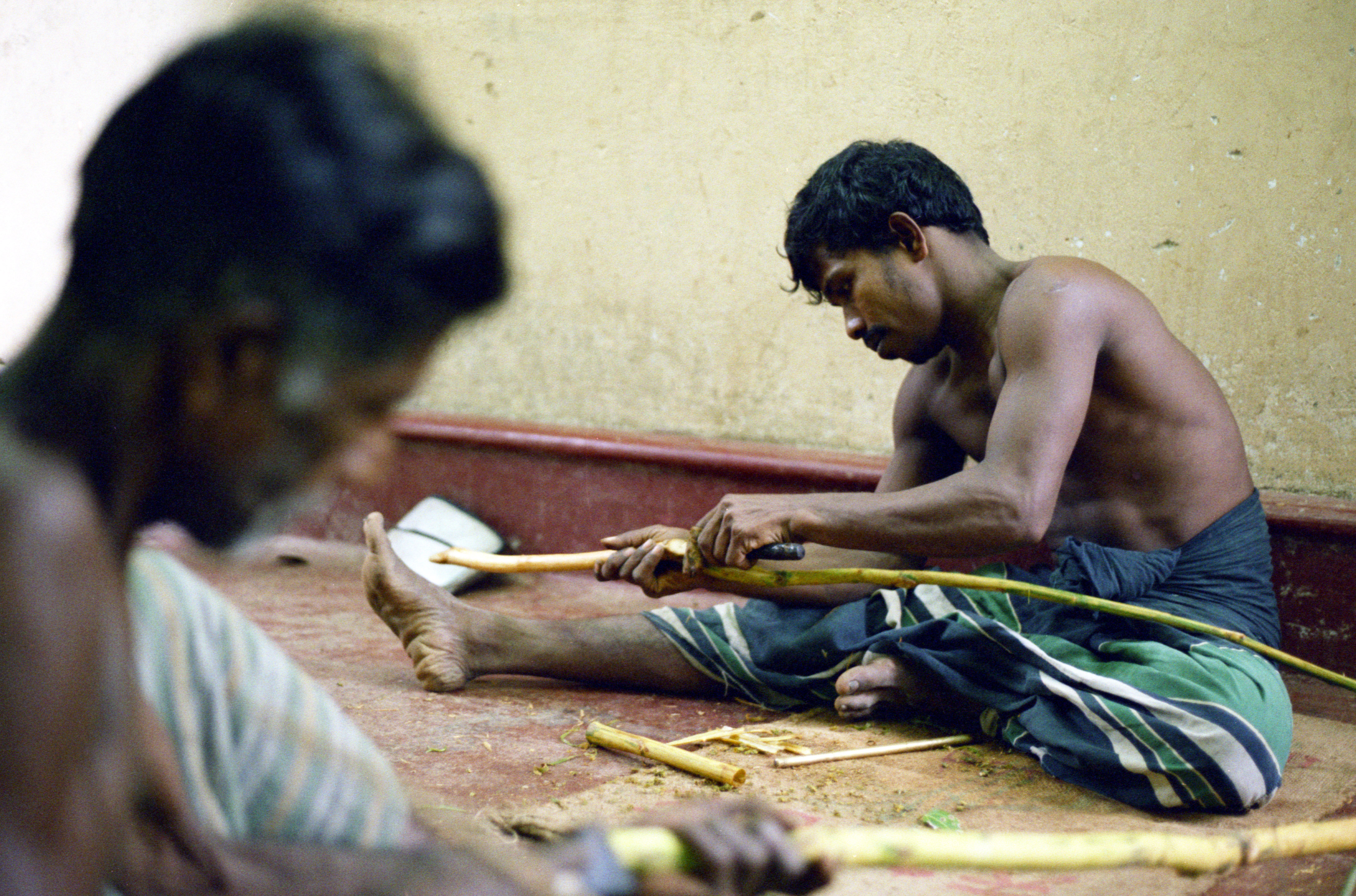 Cinnamon farmers peeling the bark off the branch in Sri Lanka